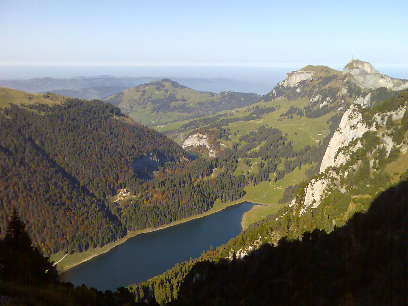 Blick zum Sämtisersee hinab, links oberhalb des Sees liegt im Wald das Gasthaus Plattenbödeli; Blickrichtung Fähnern, Kamor und Hoher Kasten, fotografiert östlich des Berggasthauses Staubern